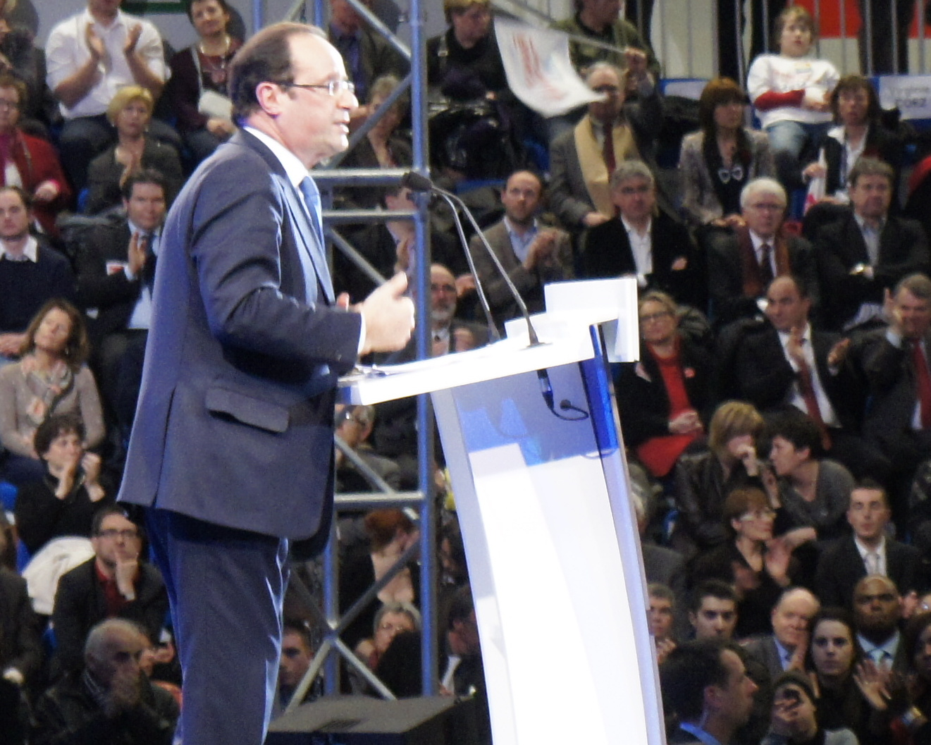 Réunion publique du candidat François Hollande à Reims.